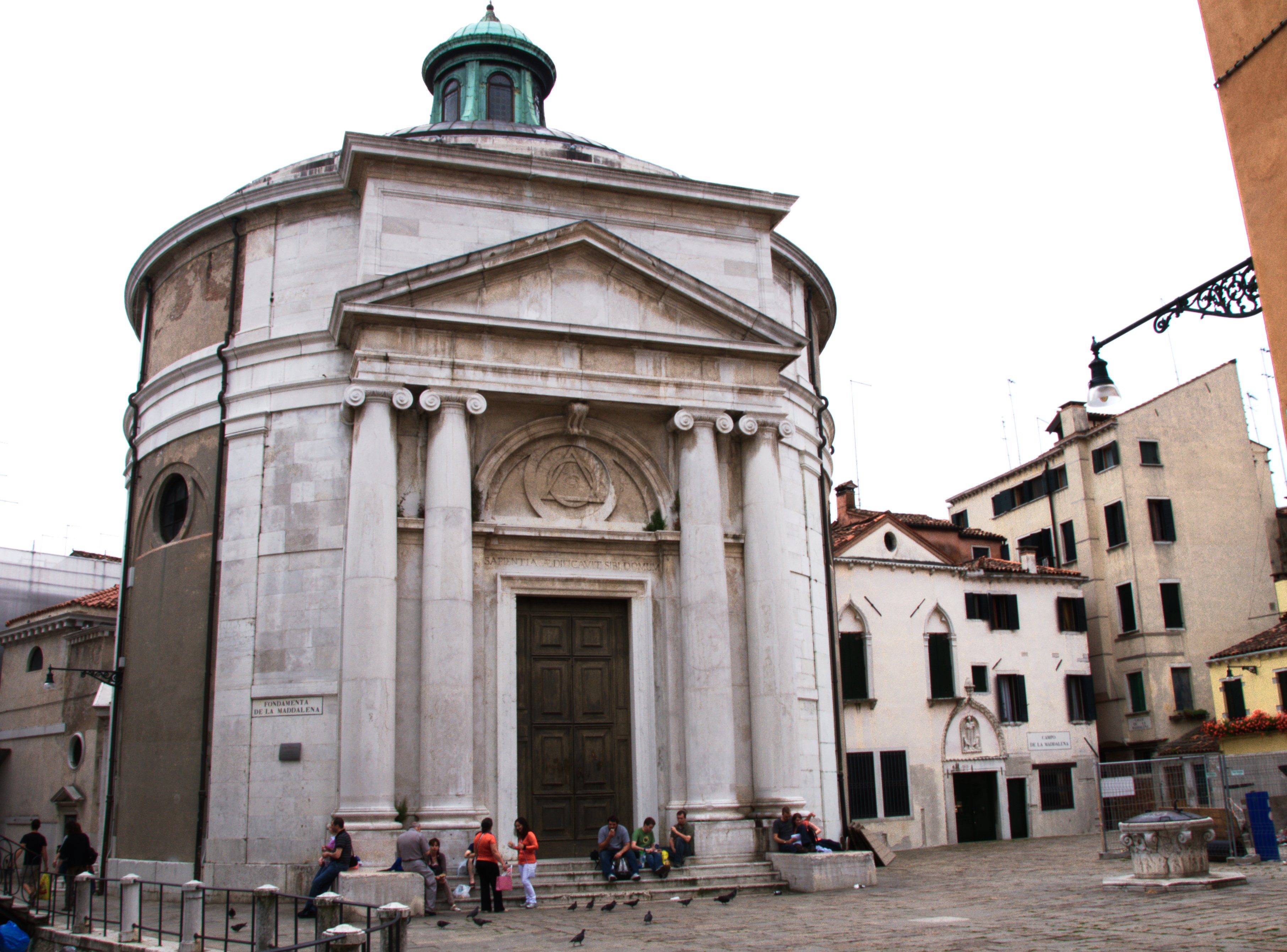 venezia venice veneto italia italy travel creative commons cc gnuckx panoramio flickr geotag wiki wikipedia